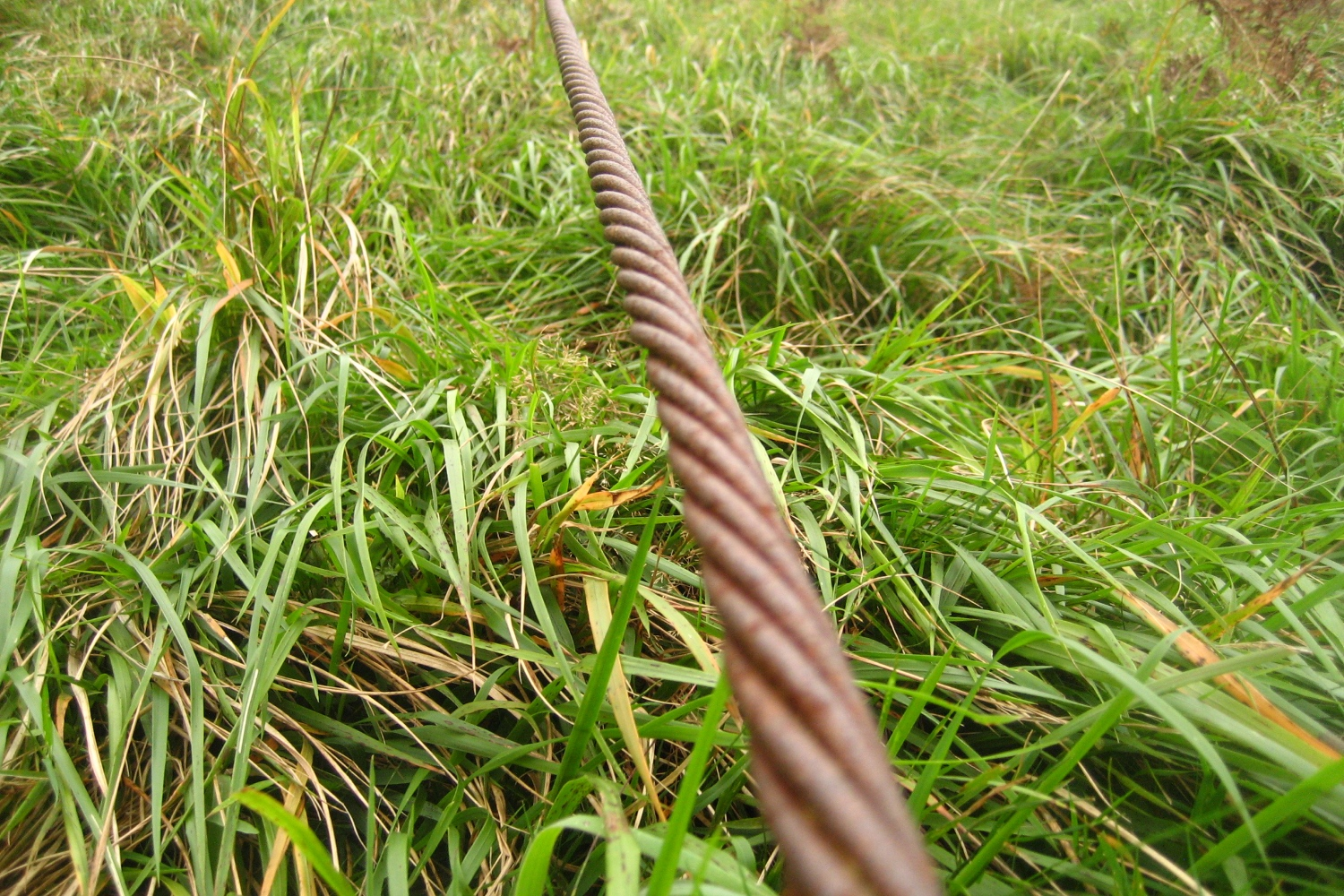 Belar kable bat Aralarko Malloetako aldapa batean.